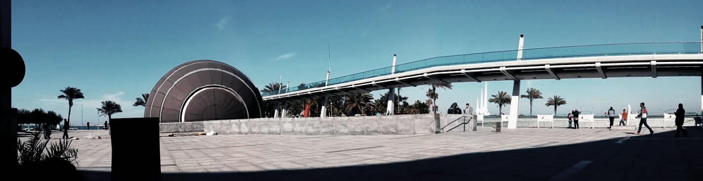 القبة السَماوية في مَكتبة الإسكندرية